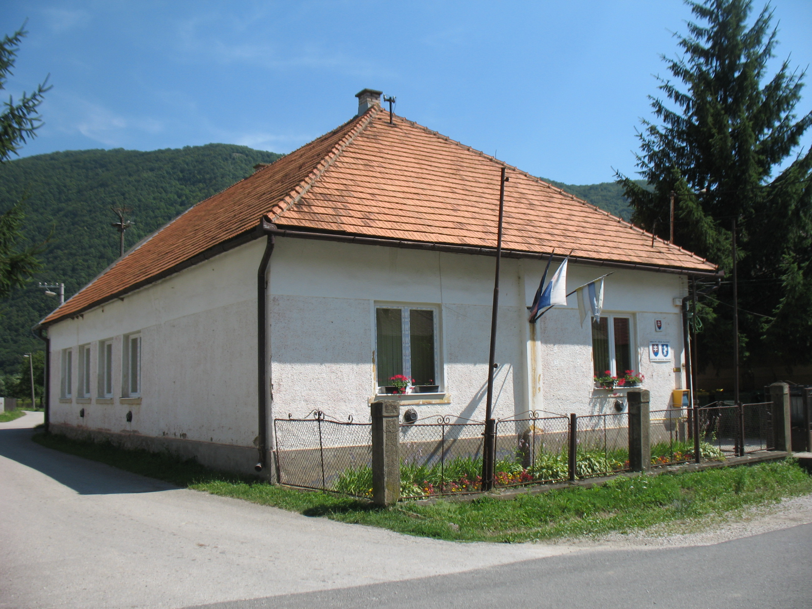 Szalóc